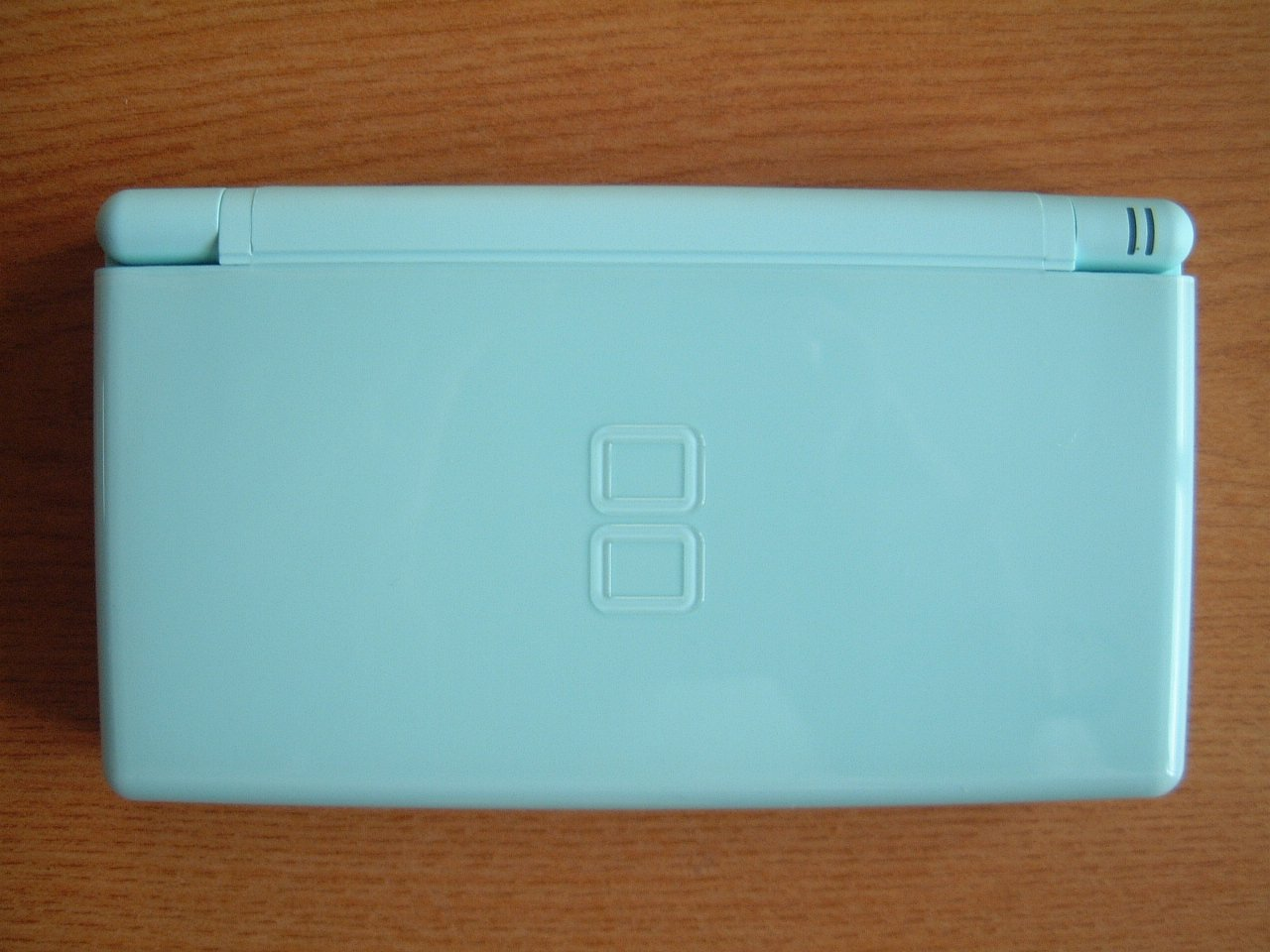 DS Lite 閉じ